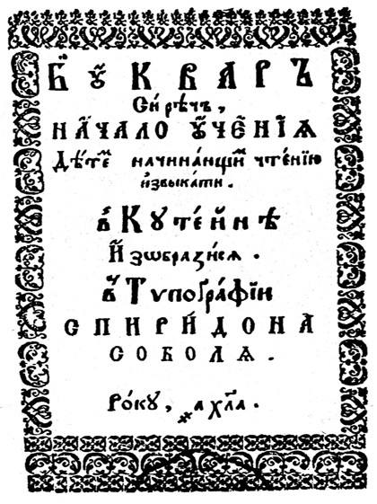 Спиридон Соболь. Букварь. Титульный лист. 1631 год. Кутеинская типография. «Букварь сиречь начало учения детям начинающим чтению извыкати». «В Кутейно изобразися в типографии Спиридона Соболя. Року 1631».